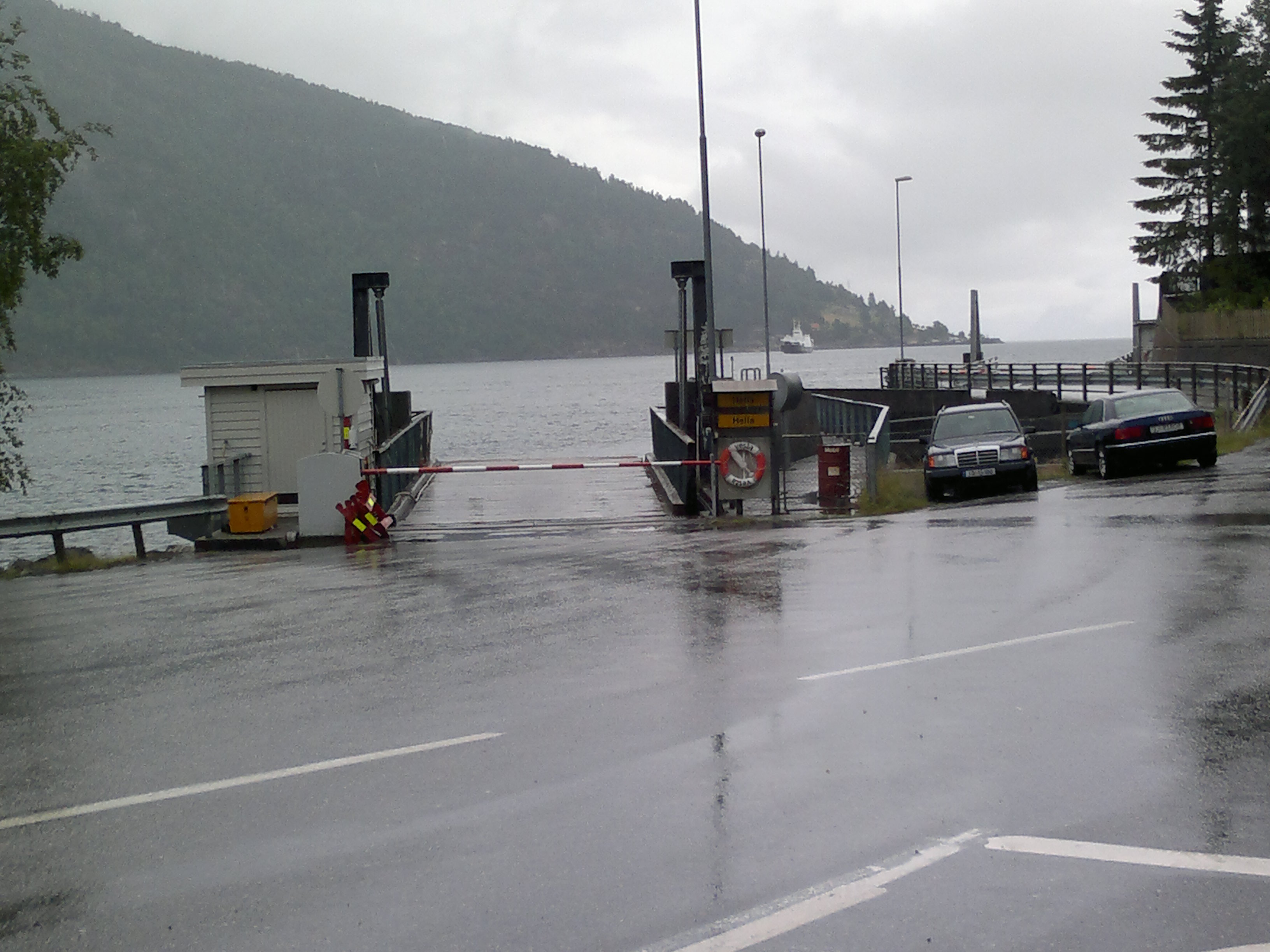 Dragsvikin satama Norjassa. Reitti Dragsvik-Hella.